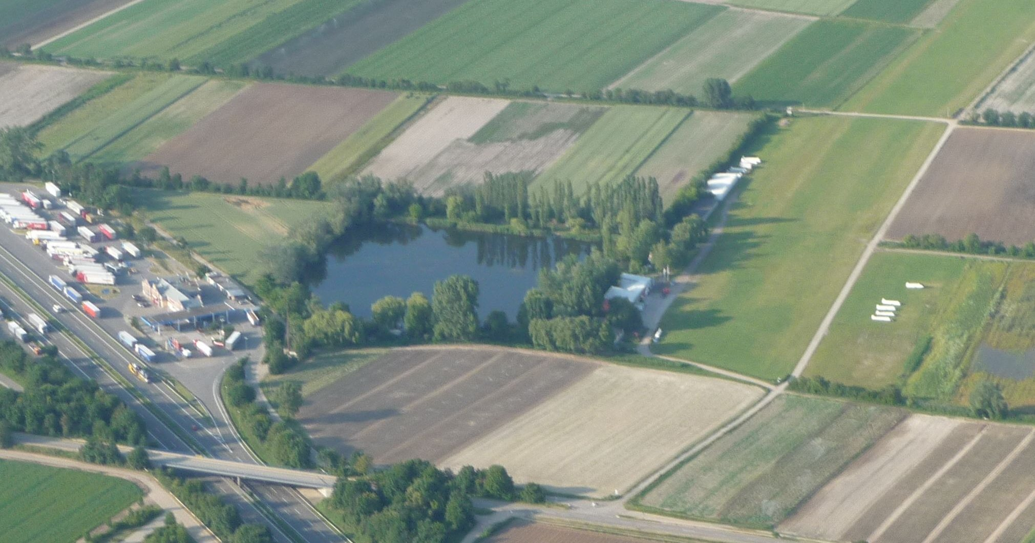 Segelfluggelände Dannstadt